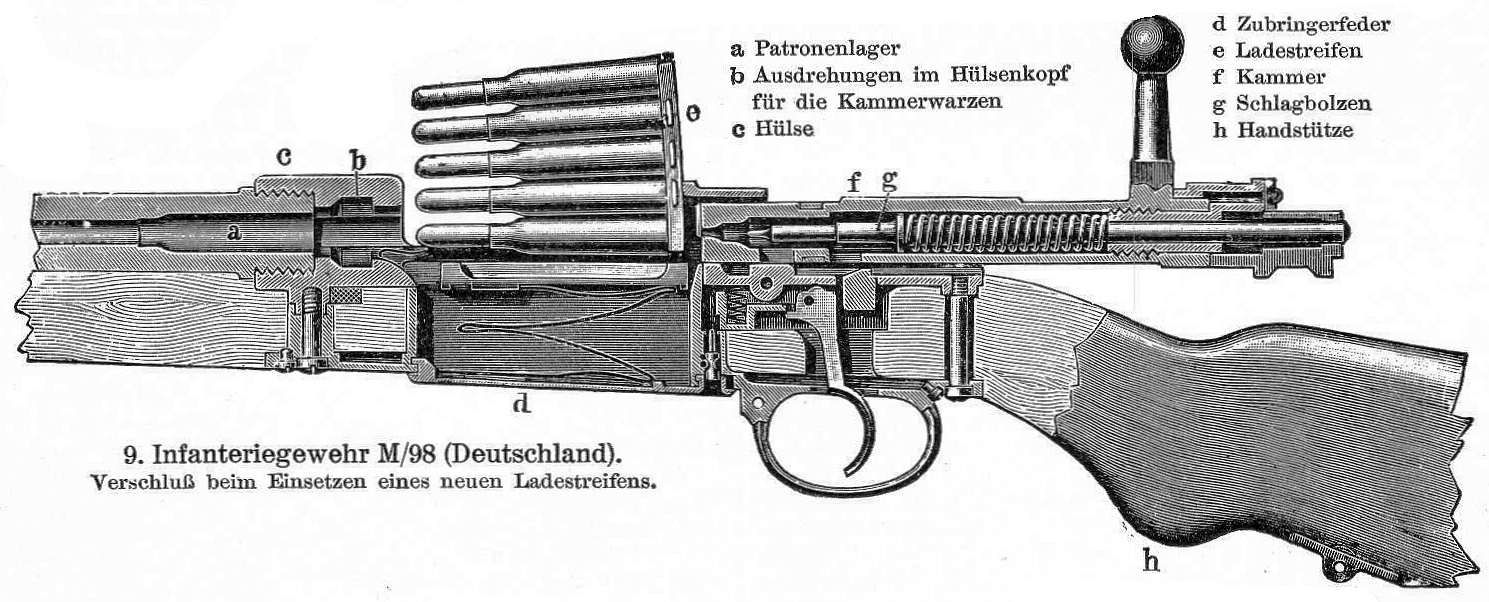 "Infanteriegewehr M/98 (Deutschland). Verschluß beim Einsetzen eines neuen Ladestreifens."